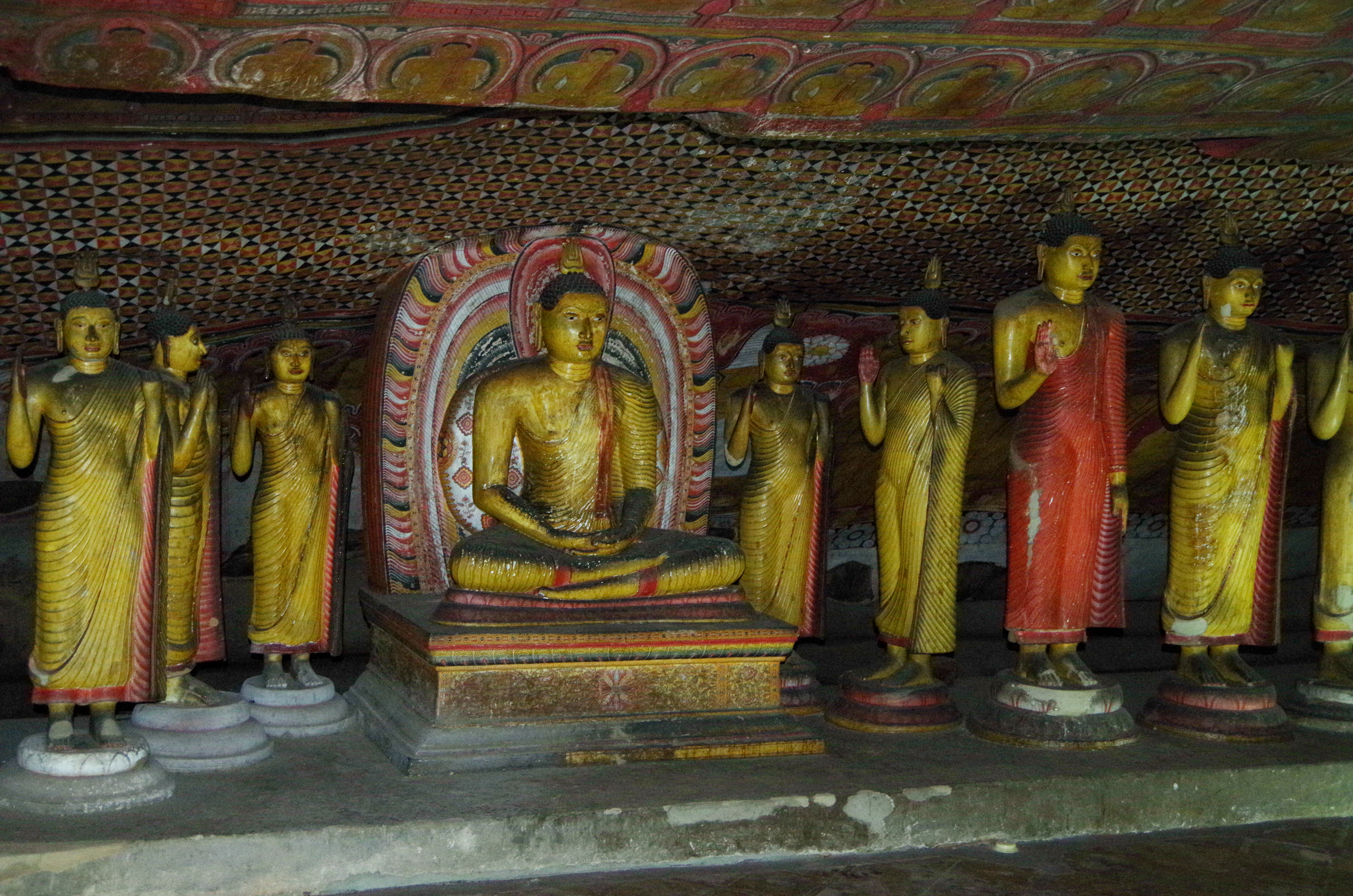 Höhlentempel Dambulla